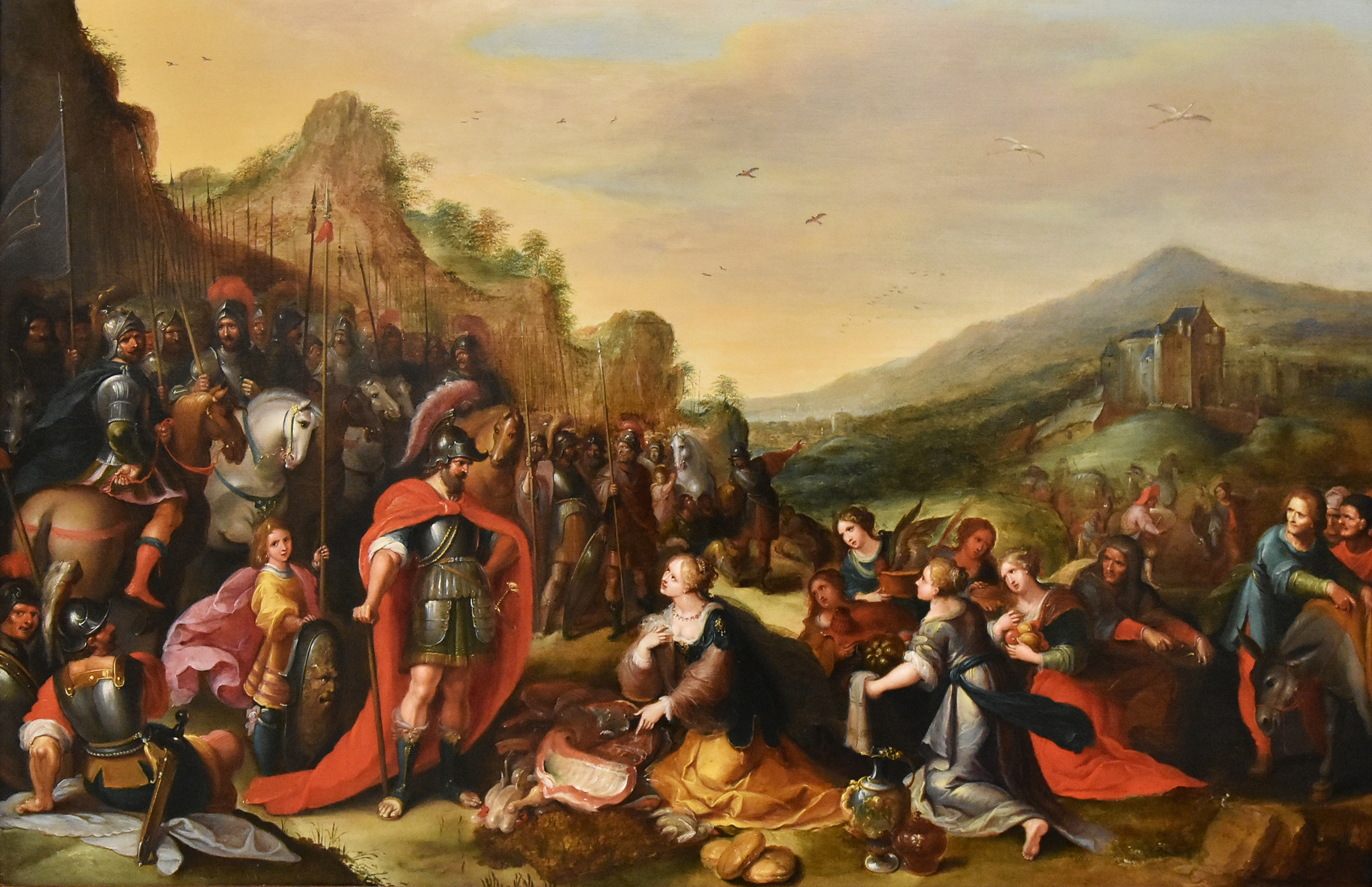 Frans Francken (II) (1581-1642) David ontmoet Abigaïl - La Boverie Luik 23-08-2018 This photo of movable heritage has been taken in the Walloon Region